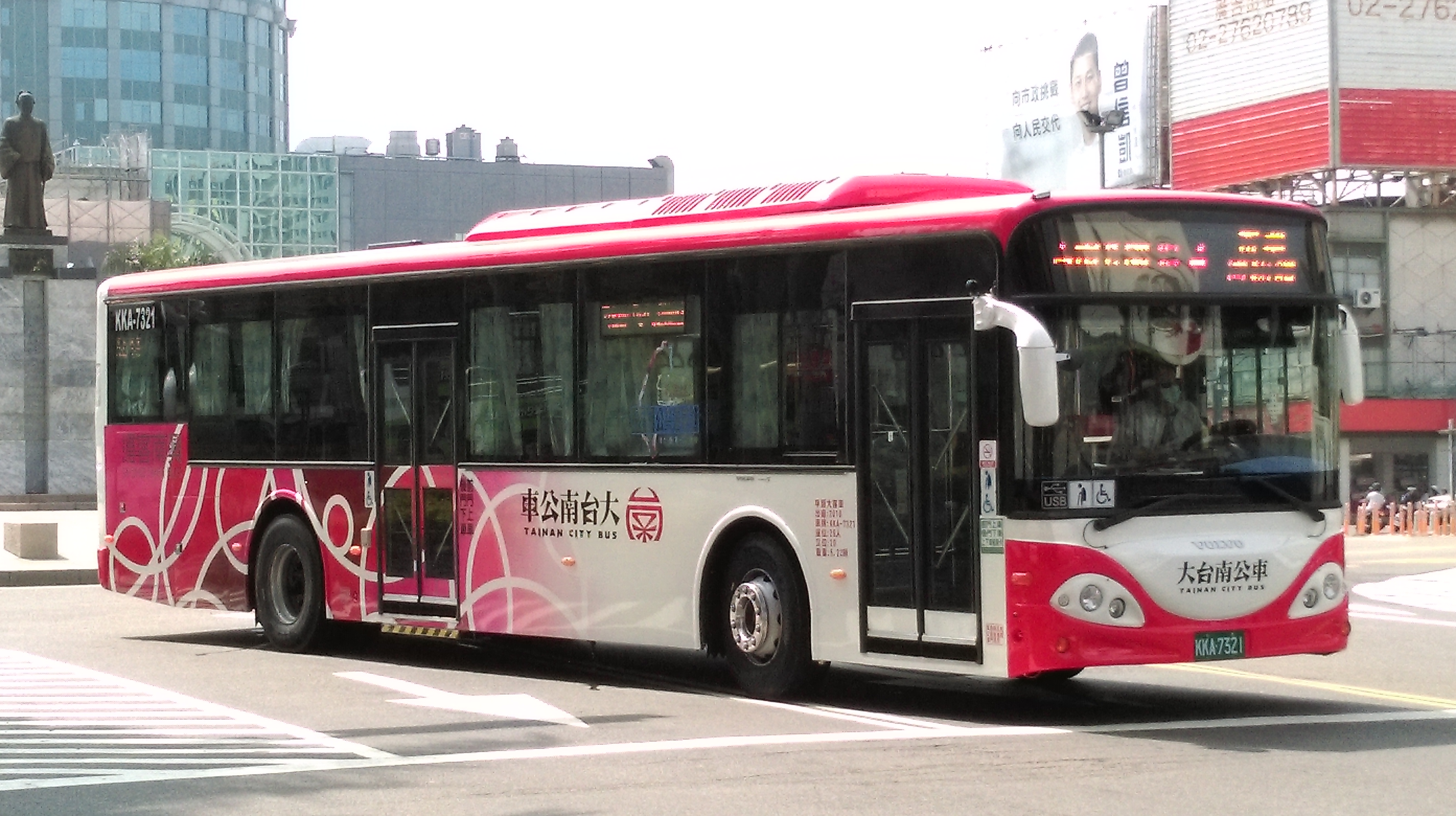 中文（台灣）: 興南客運2018年5月出廠VOLVO B7RLE，紅線配車KKA-7321